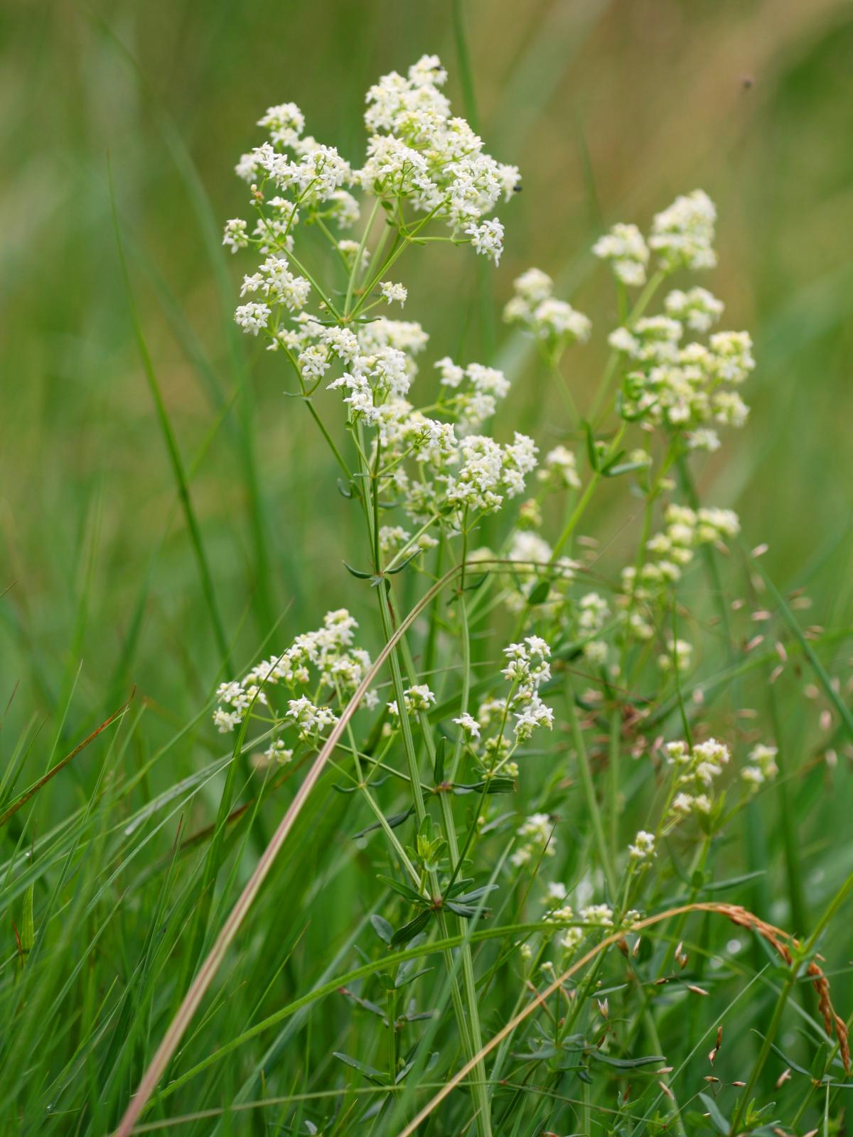 Nordisches Labkraut (Galium boreale)